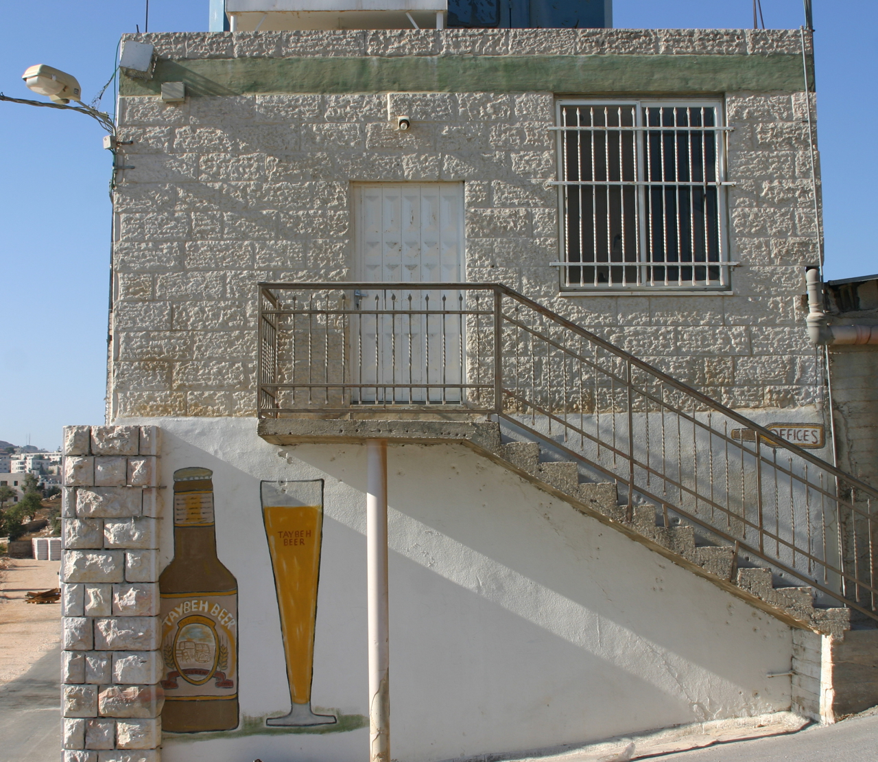 Die Taybeh-Brauerei in Taybeh, Palästina. Object location31° 57′ 20″ N, 35° 17′ 51″ E